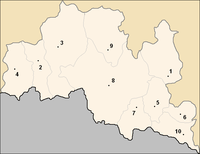 Sujet : carte des obchtini (municipalités) de l'oblast de Smolyan, en Bulgarie Auteurs : Потребител:Ljubo (Любомир Таушанов = Lyoubomir Taouchanov), pour la version originale en bulgare, Utilisateur:Hégésippe Cormier, pour l'adaptation française (repères chiffrés) Source : Картинка:Smolian Oblast map.PNG (7 mai 2005) Licence